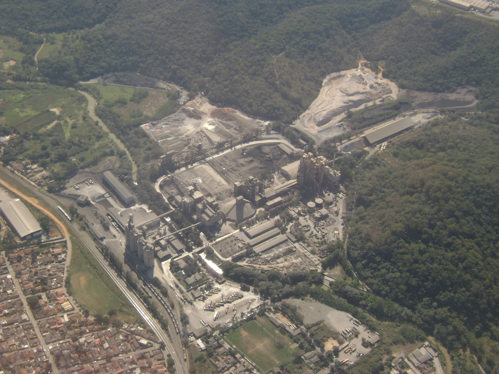 Mineradora vista de um avião próxima ao Aeroporto Internacional de Belo Horizonte - Confins.